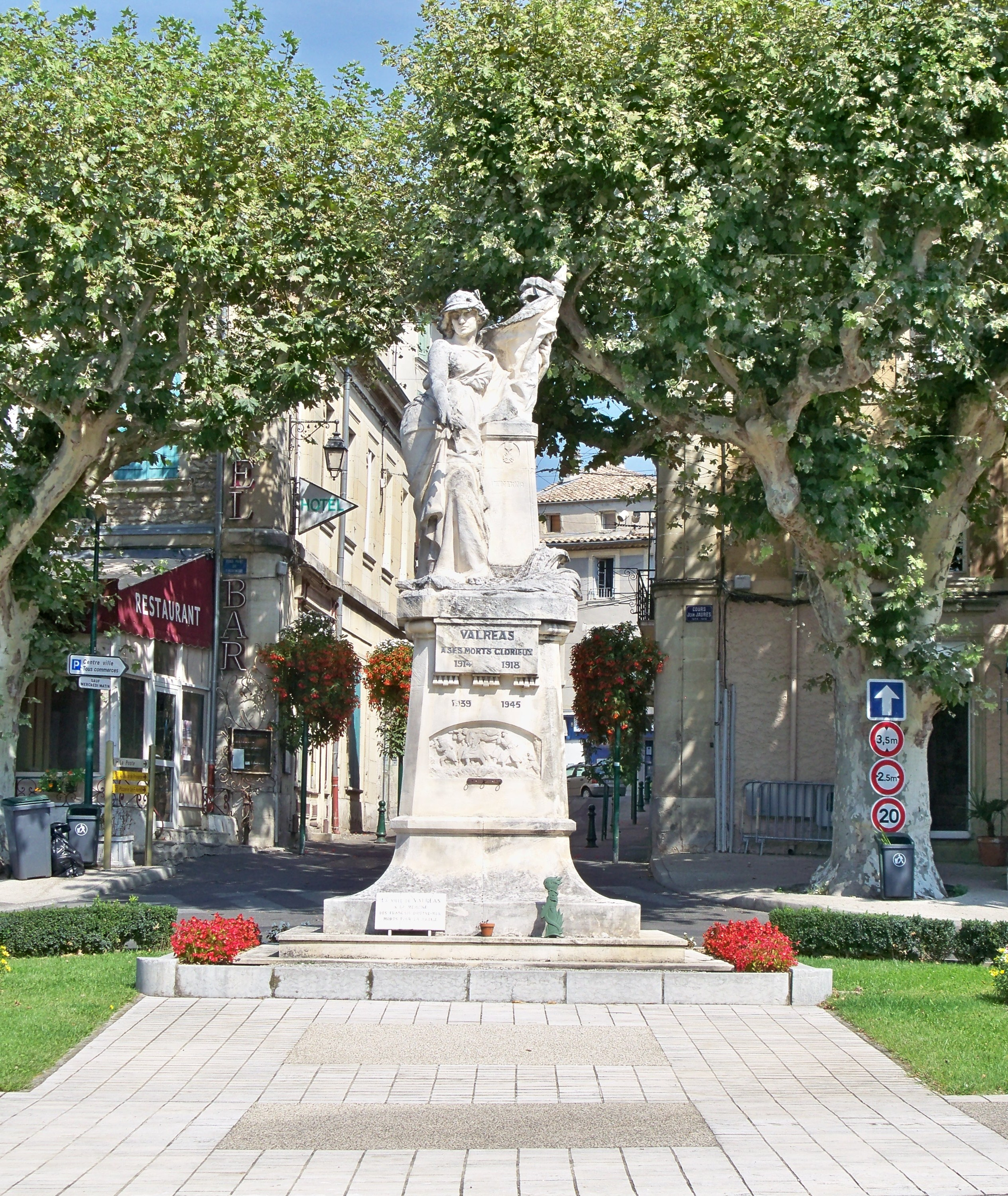 Monument aux morts de Valréas